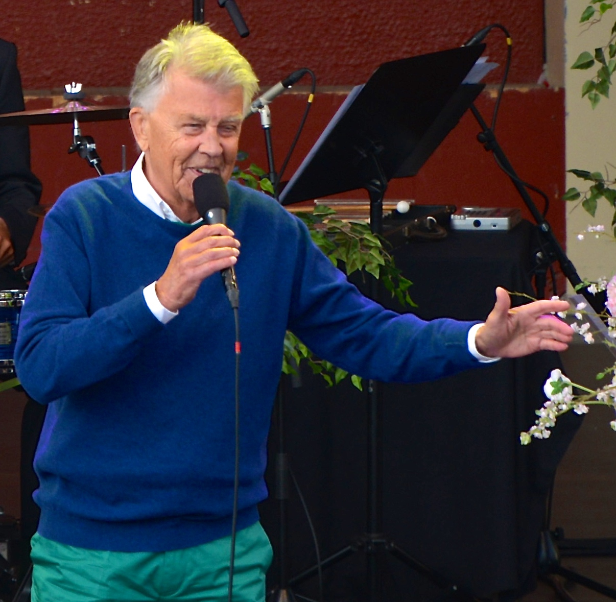 Sven-Bertil Taube på Gröna Lund i Stockholm den 24 juni 2014.